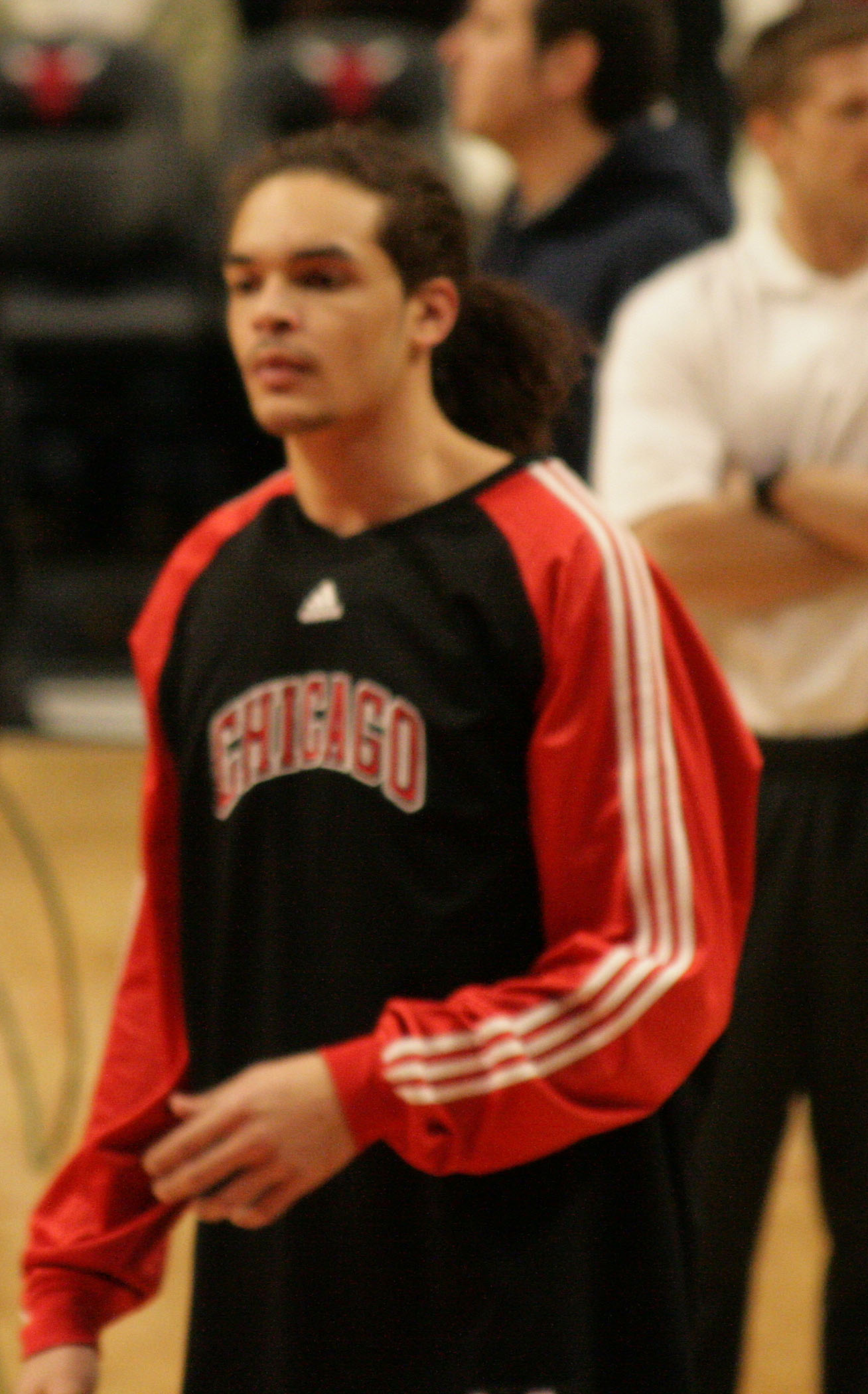 Joakim Noah